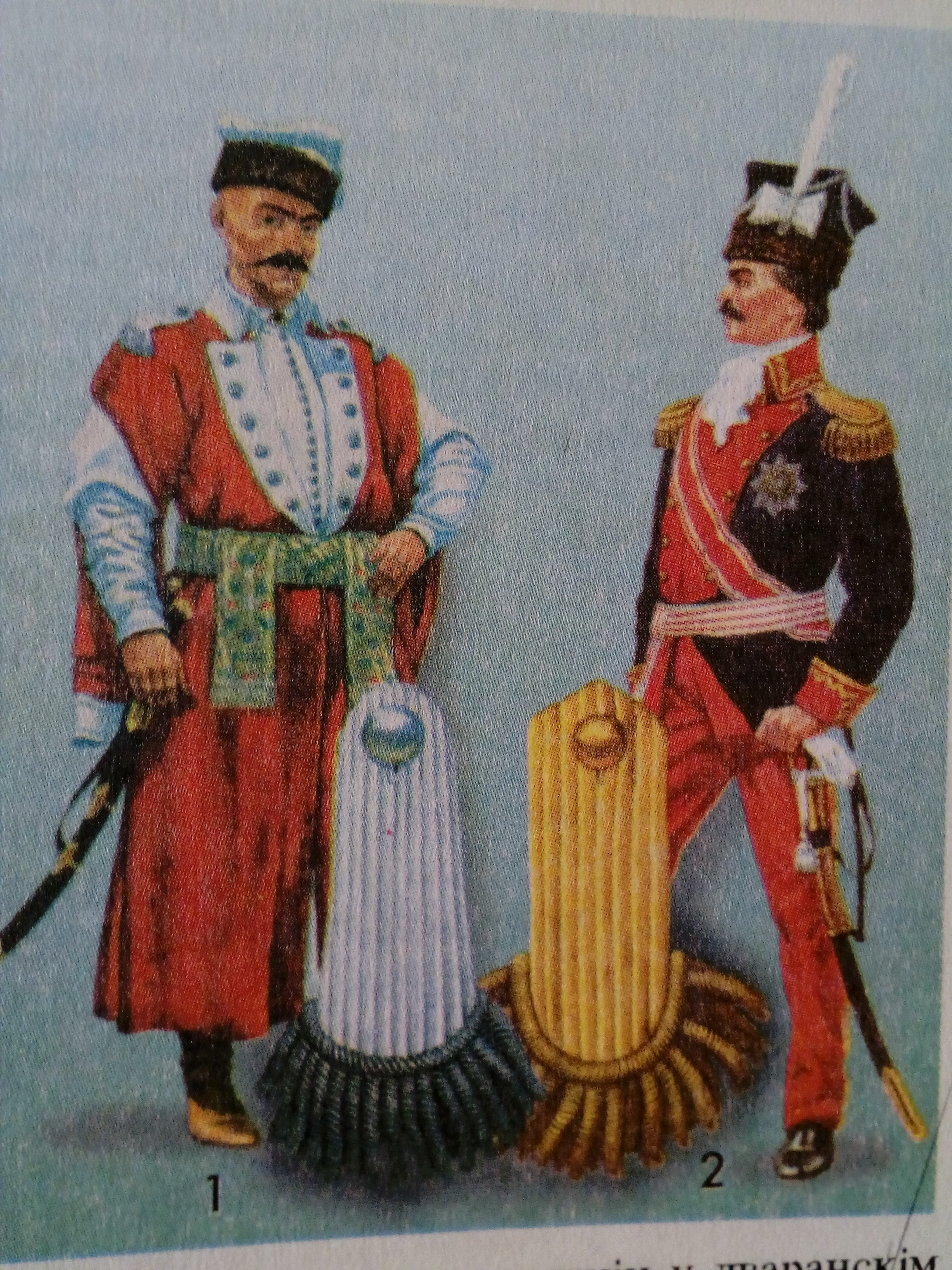 Вайскоўцы з эпалетамі